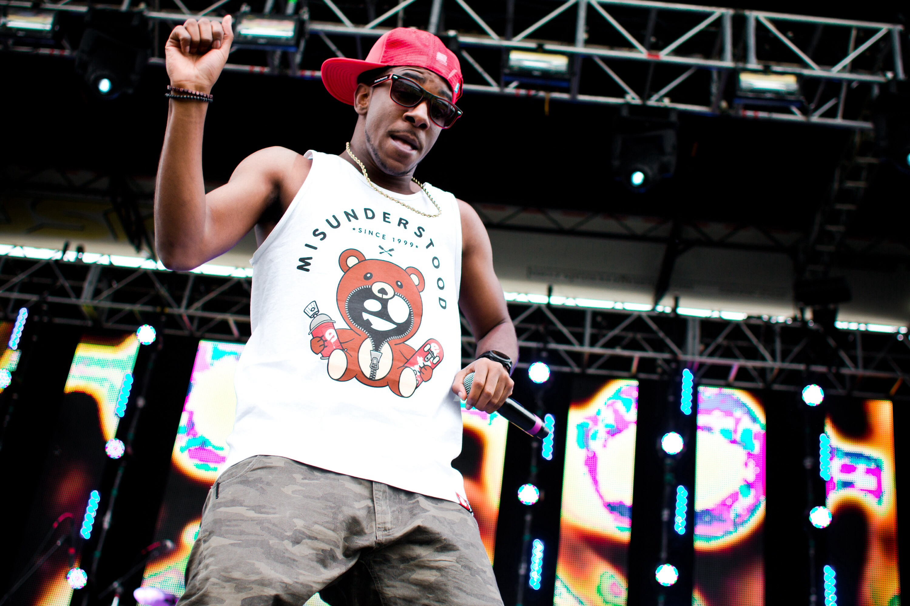 XV performance Dancefestopia 2013